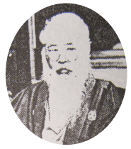 三河南設楽郡東郷村出身の医師・実業家・郷土史家である牧野文斎。信玄病院院長。